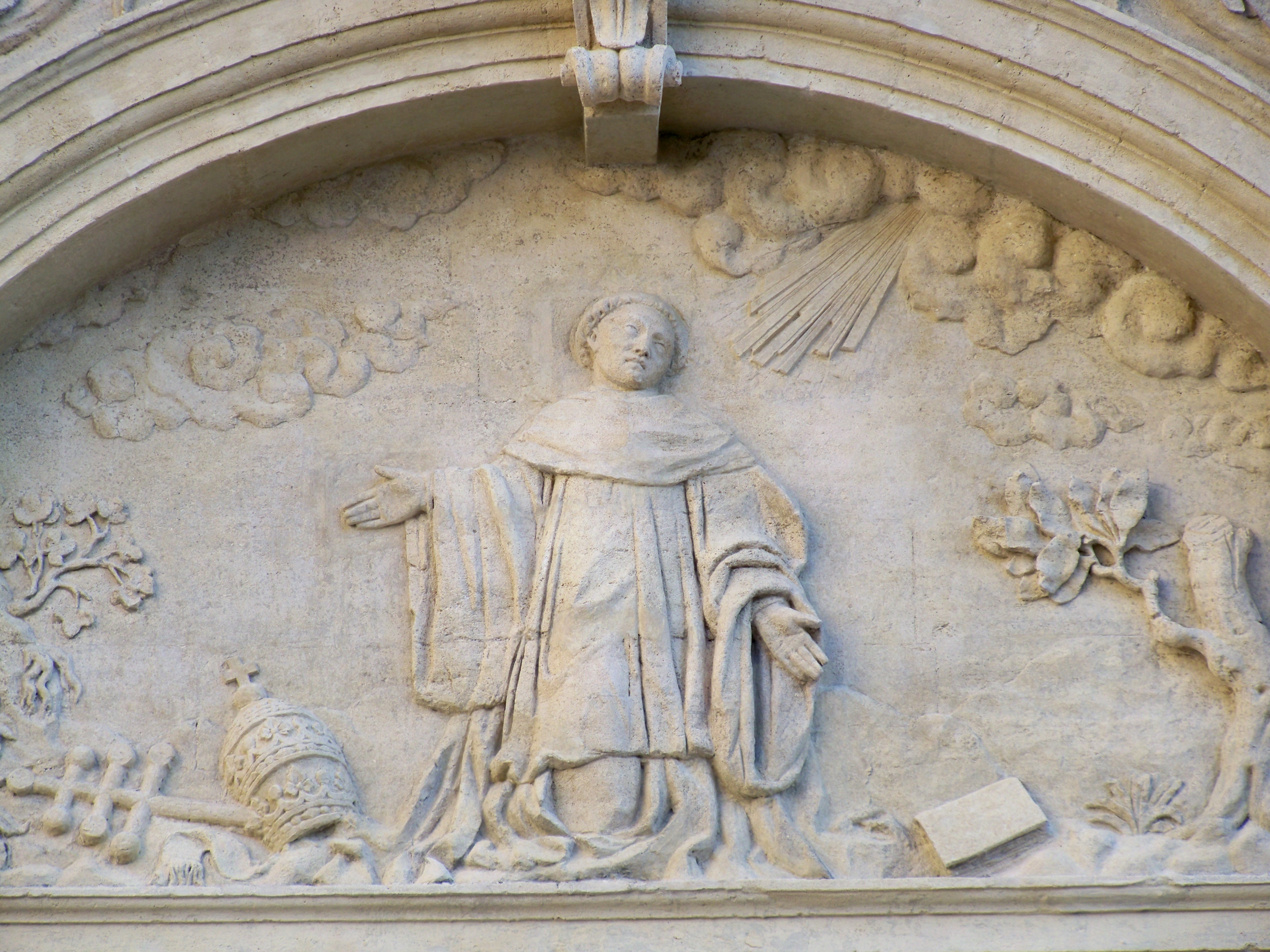 Portail du cloitre des Célestins à Avignon (84) .